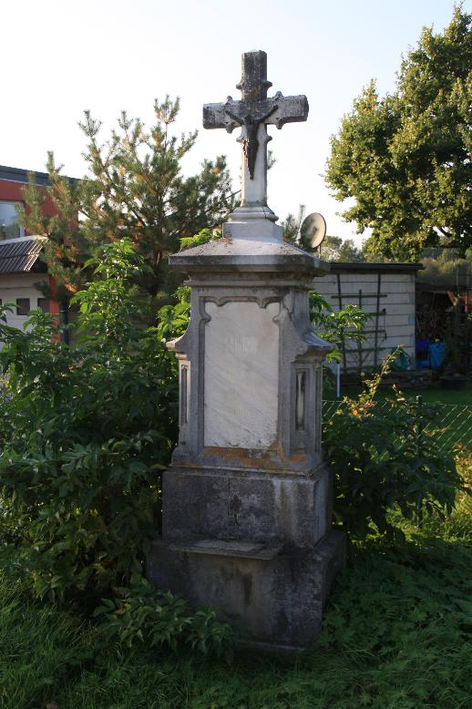 Das Memorienkreuz an der Neffelbachbrücke in Hochkirchen